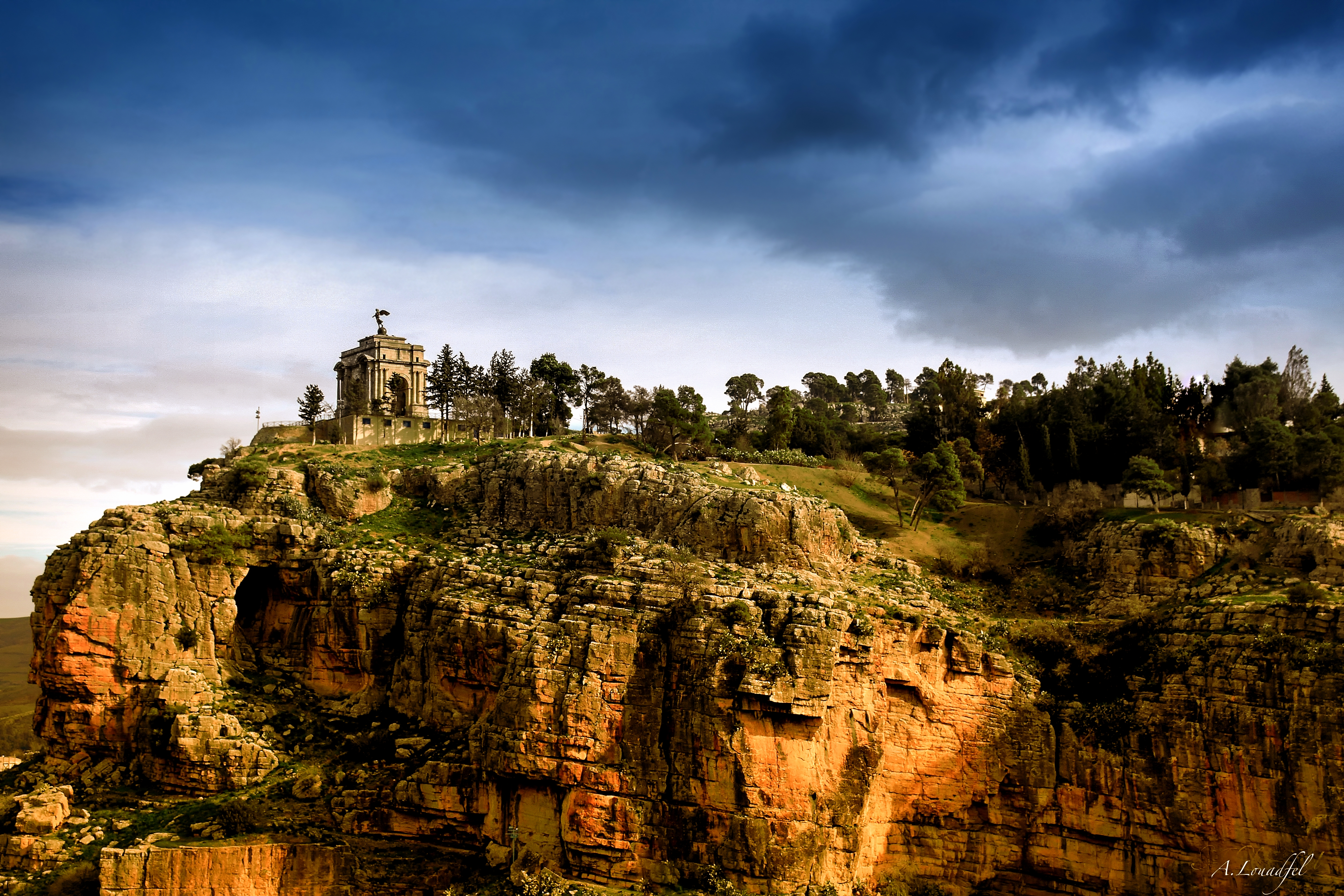 Le monument aux morts de Constantine en hommage aux victimes morts pendant la première guerre 1914-1918